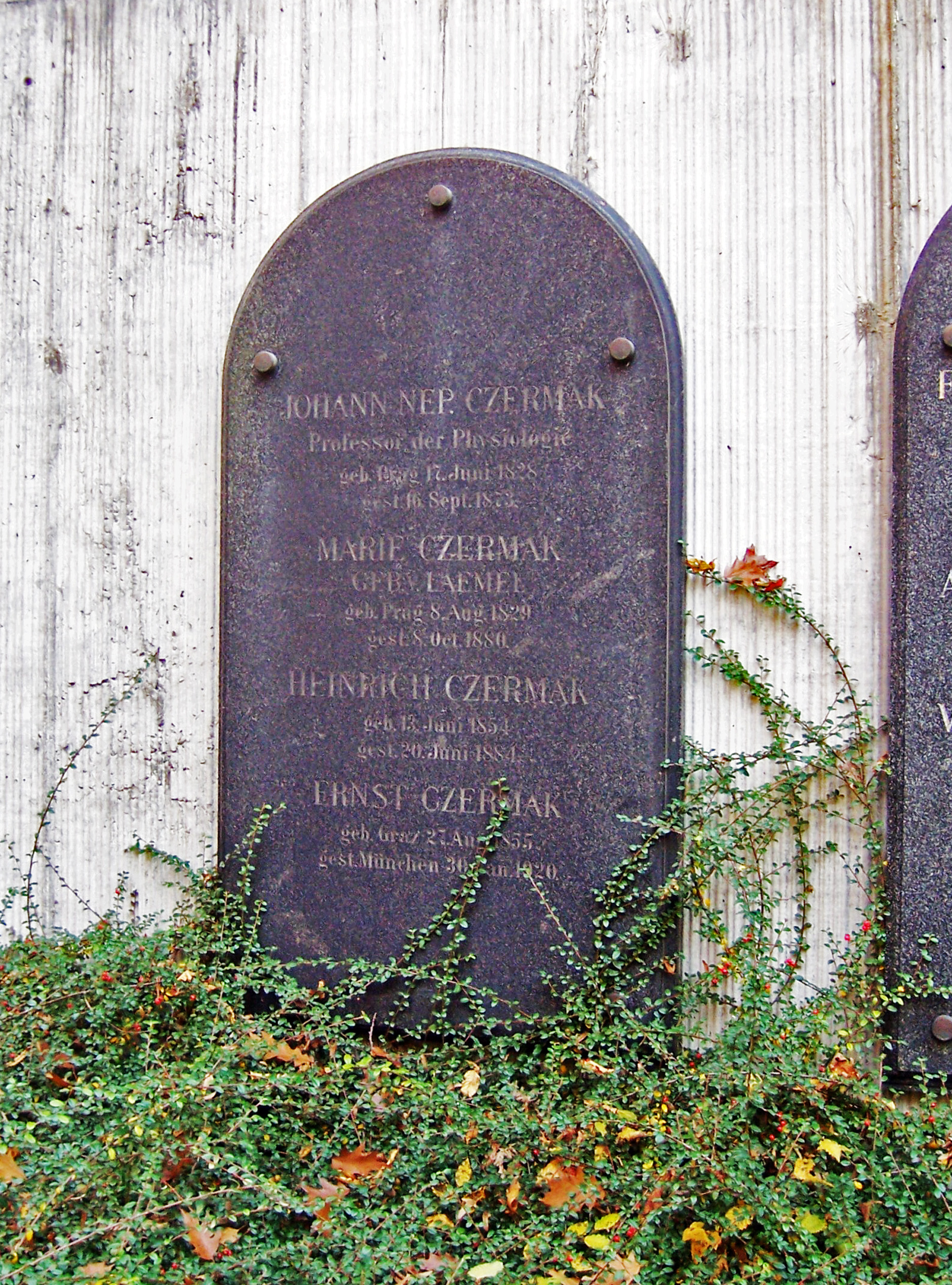 Grabplatte Johann Nepomuk Czermak und Ehefrau Marie, geb. von Lämel